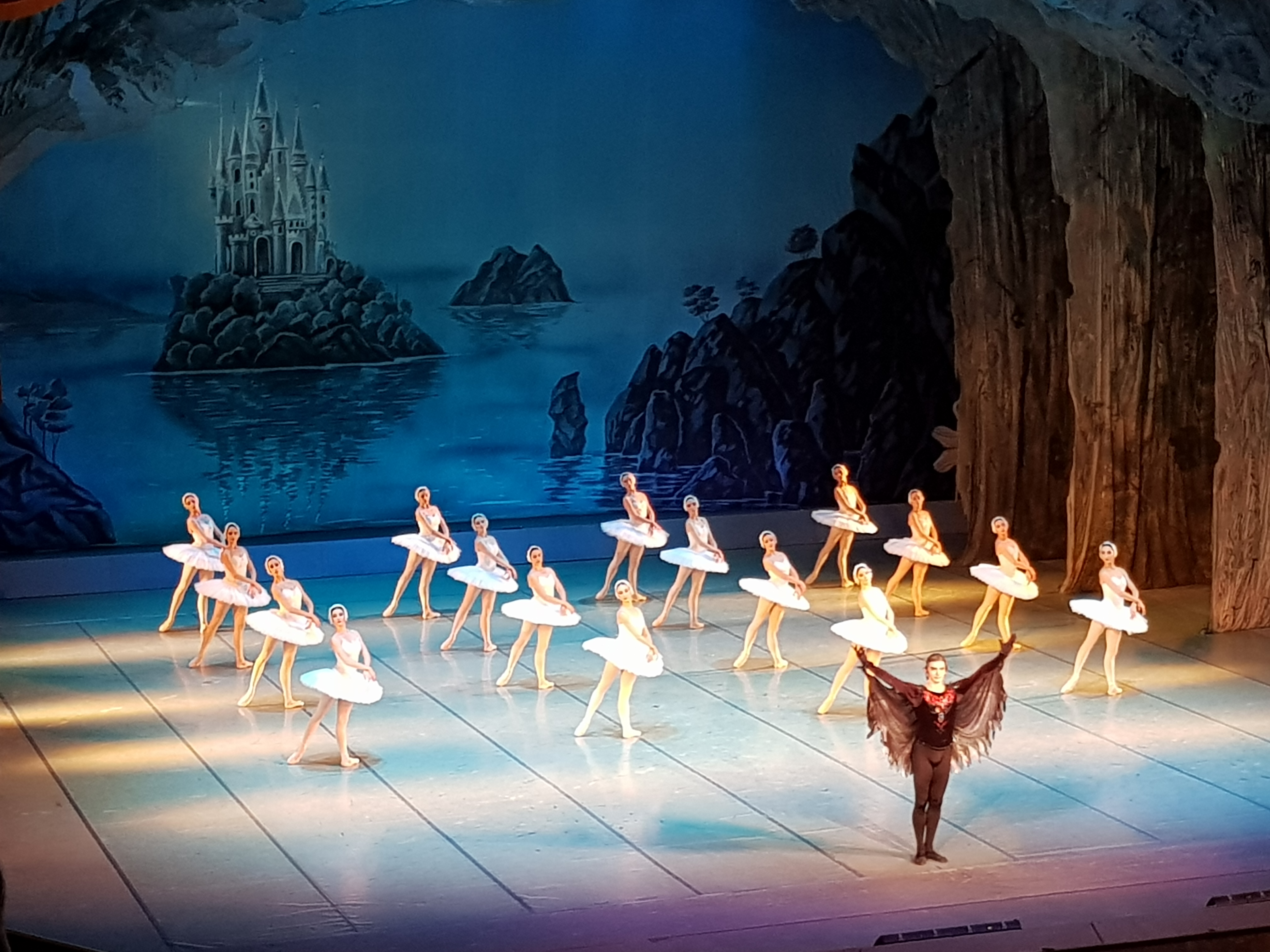 Le Lac des Cygnes - Théâtre d'opéra et de ballet de Minsk - Novembre 2018